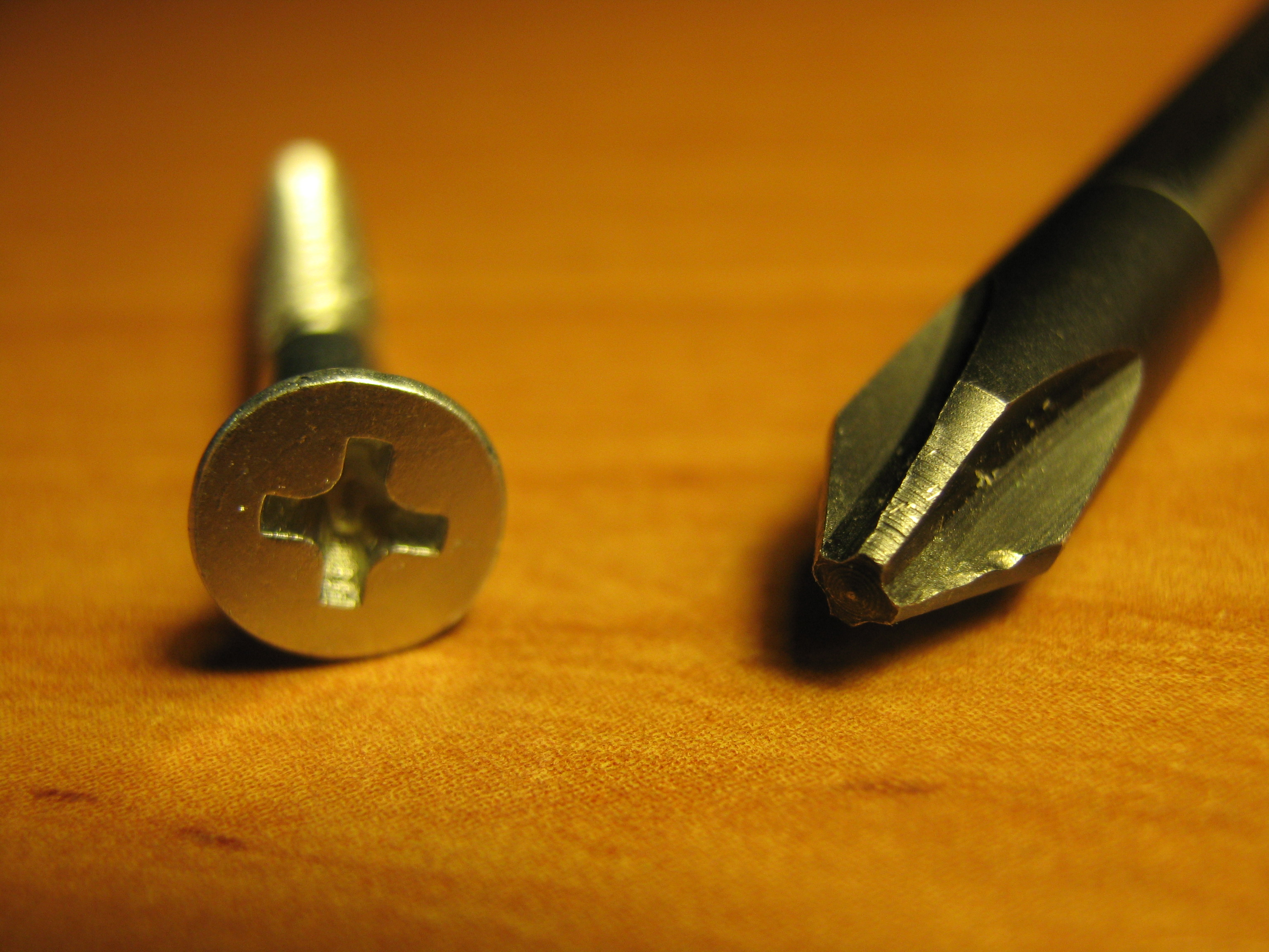 Отвёртка Филлипс с соответствующим крепежом